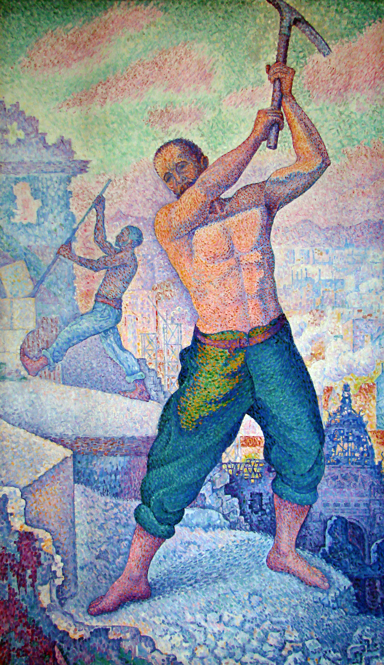 Le Démolisseur (1897-1899) par Paul Signac (1863-1935). Musée des Beaux-Arts de Nancy.